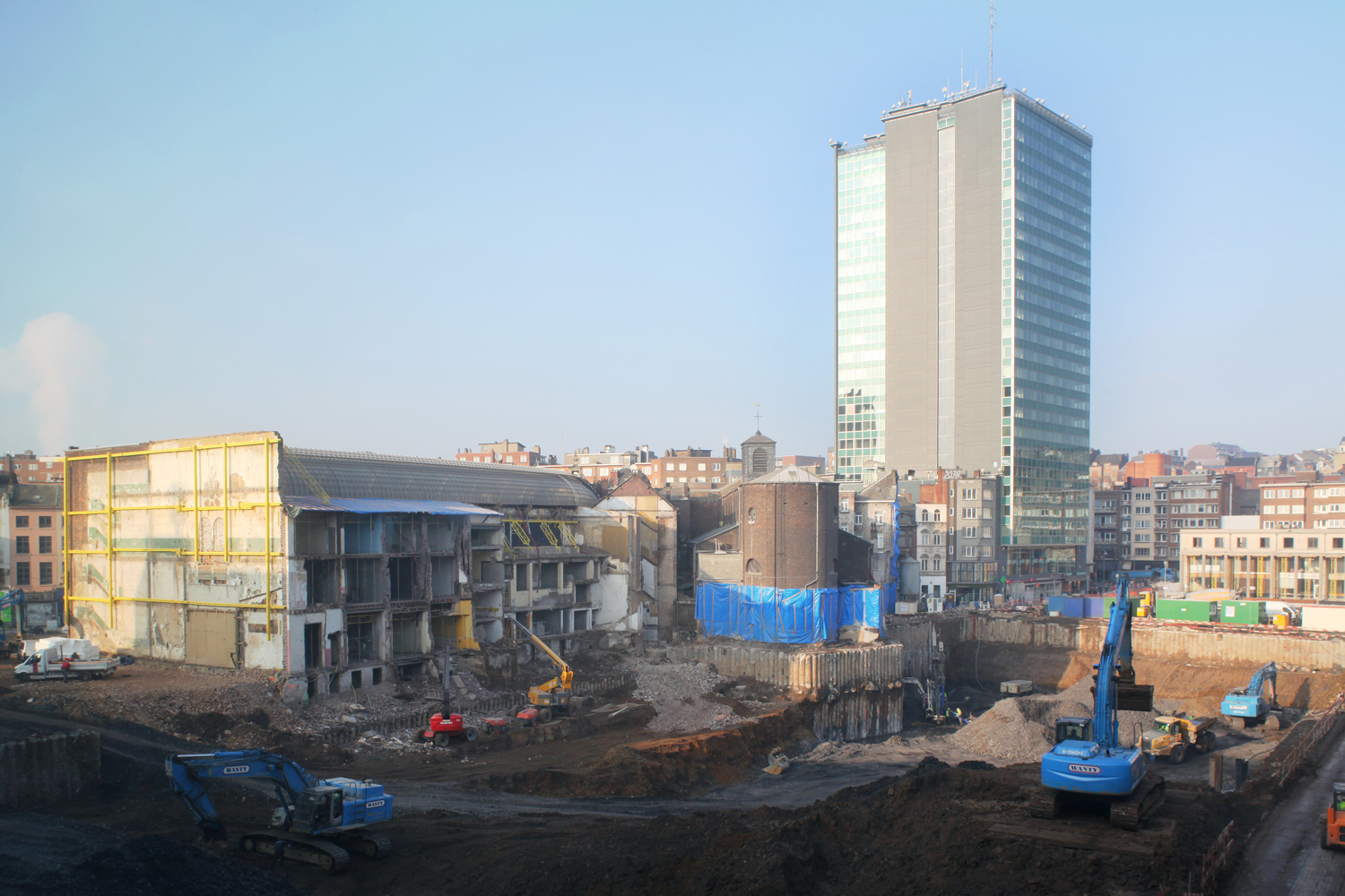 Vue large des travaux du projet de rénovation "Rive Gauche" à la ville basse de Charleroi.